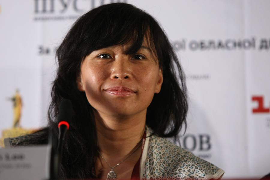 Ли Сук-Йин, режиссёр фильма «Год плотоядия» (2009). Пресс-конференция представителей фильмов «Год плотоядия» и «Колыбельная», Одесский международный кинофестиваль 2010. Depicted person: Sook-Yin Lee